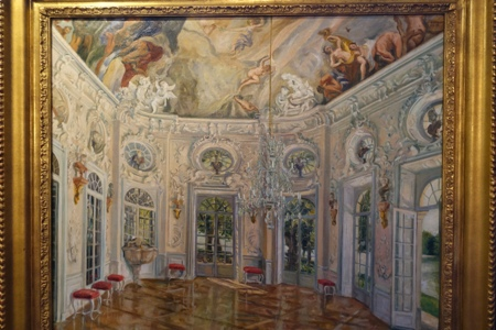 Das Ölgemälde Karl Kecks zeigt eine Innenansicht der Badenburg in München